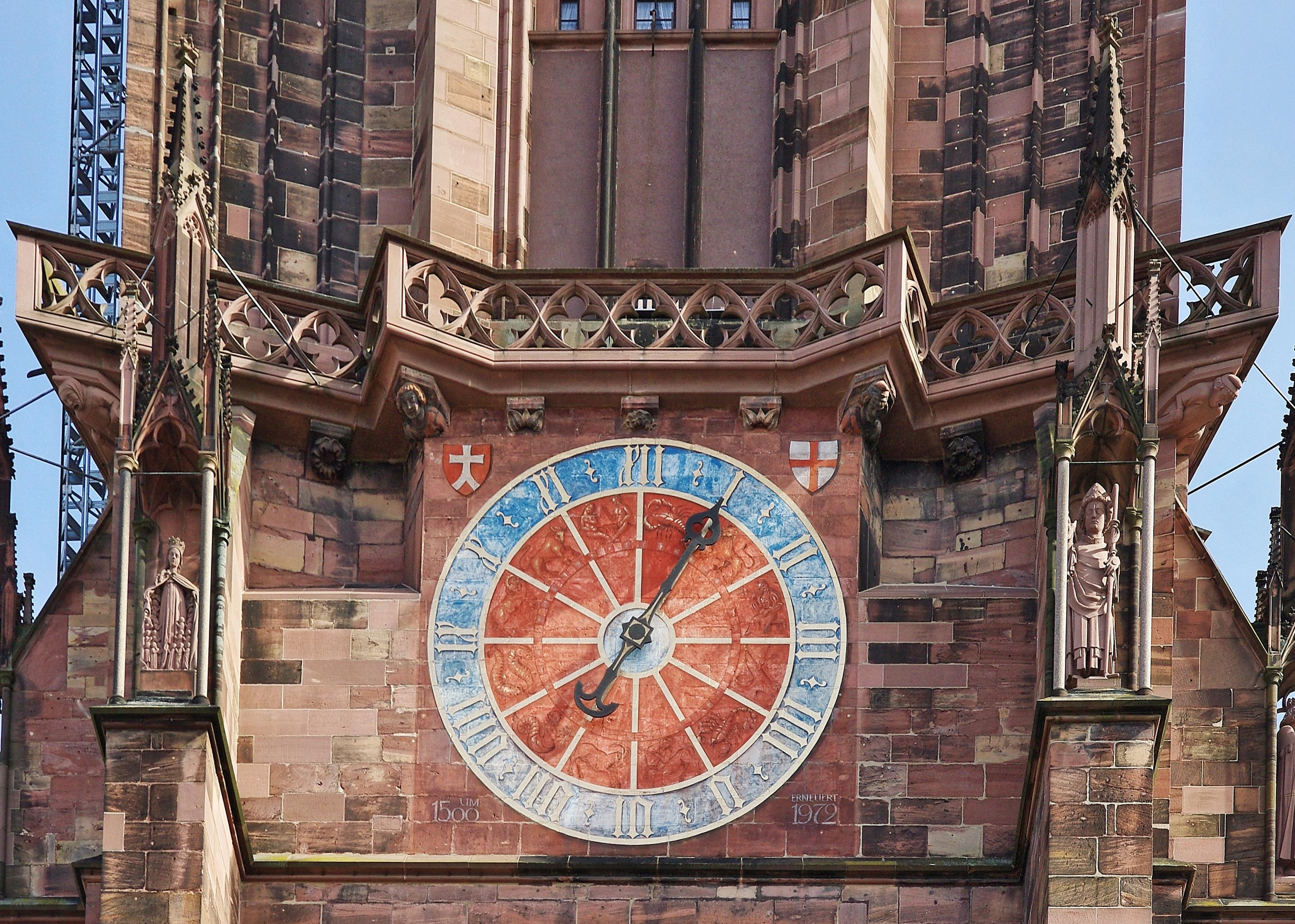 Die Uhr über dem Haupteingang Die Uhr am Freiburger Münster